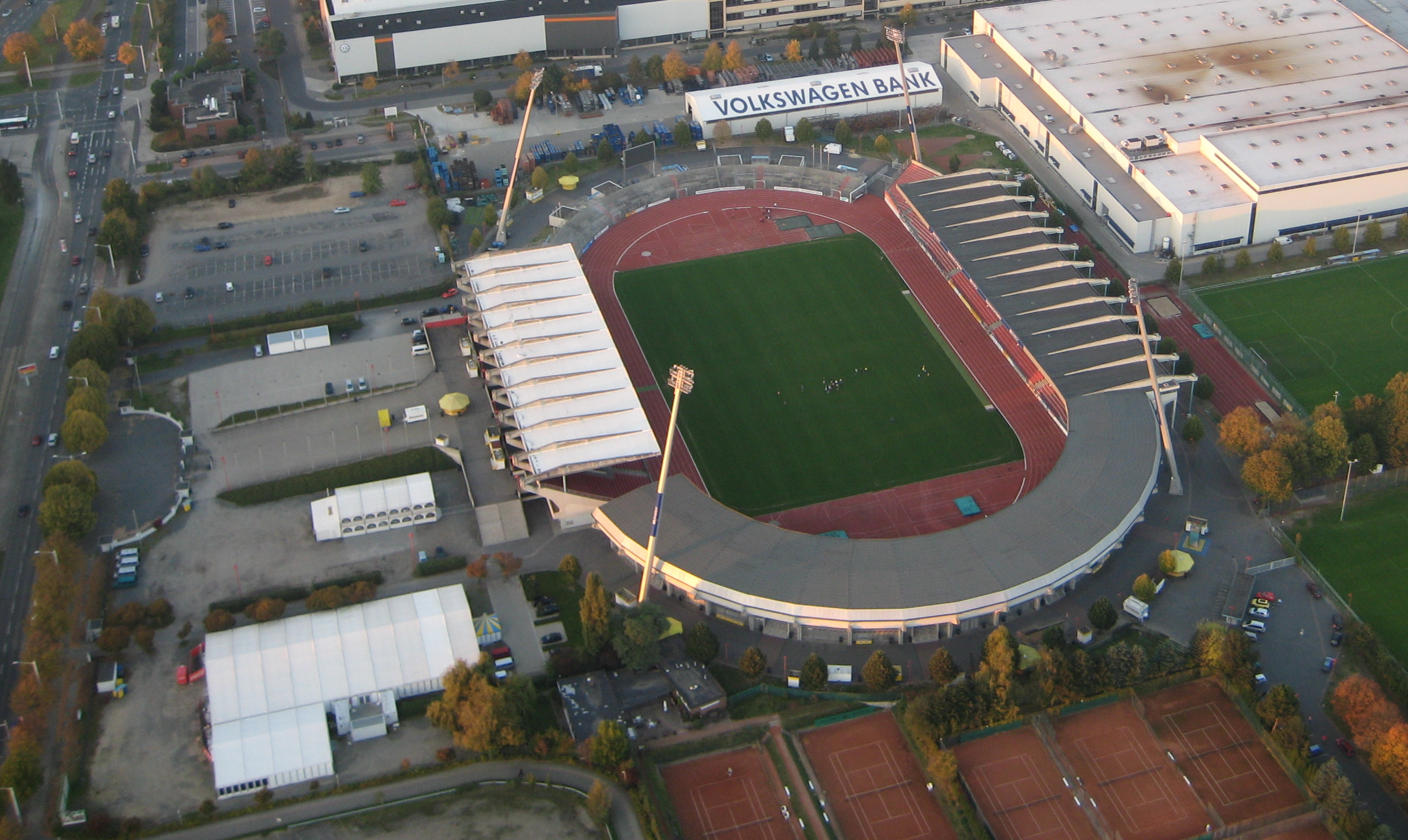 Stadion an der Hamburger Strasse Blick aus südlicher Richtung